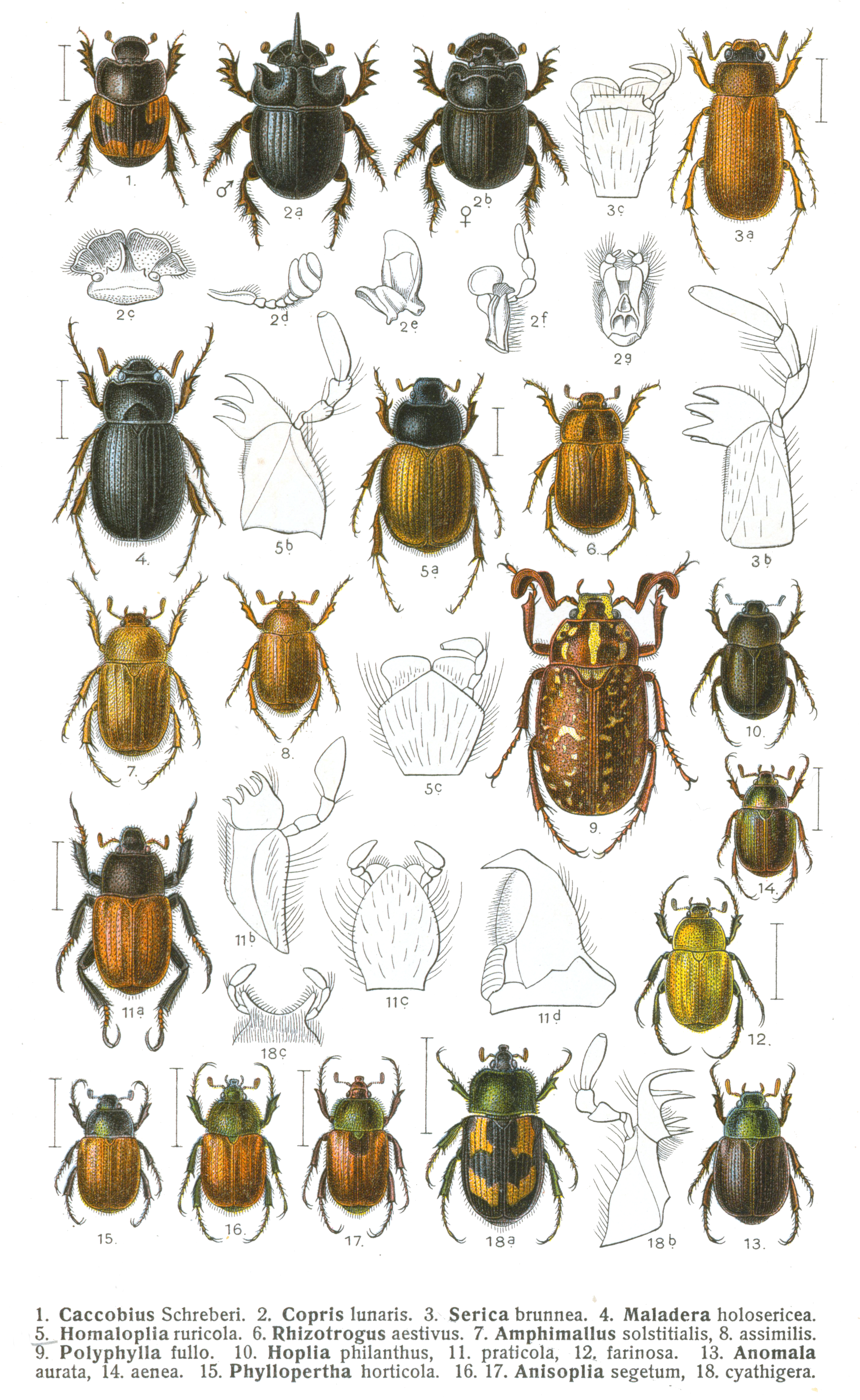 See image for index to numbers. Caccobius schreberi Lin. = Caccobius schreberi (Linnaeus, 1758), adult, dorsal view Copris lunaris Lin. = Copris lunaris (Linnaeus, 1758) (2a: adult male, dorsal view, 2b: adult female, dorsal view, 2c: labrum, 2d: antenna, 2e: mandible, 2f: maxilla, 2g: labium) Serica brunnea Lin. = Serica brunnea (Linnaeus, 1758) (3a: adult, dorsal view, 3b: maxilla, 3c: labium) Maladera holosericea Scopoli. = Maladera holosericea (Scopoli, 1772), adult, dorsal view Homaloplia ruricola Fabr. = Omaloplia ruricola (Fabricius, 1775) (5a: adult, dorsal view, 5b: maxilla, 5c: labium) Rhizotrogus aestivus Oliv. = Rhizotrogus aestivus (Olivier, 1789), adult, dorsal view Amphimallus solstitialis Lin. = Amphimallon solstitiale (Linnaeus, 1758), adult, dorsal view Amphimallus assimilis Hrbst. = Amphimallon assimile (Herbst, 1790), adult, dorsal view Polyphylla fullo Fabr. = Polyphylla fullo (Linnaeus, 1758), adult, dorsal view Hoplia philanthus Sulzer. = Hoplia philanthus philanthus (Füssli, 1775), adult, dorsal view Hoplia praticola Duft. = Hoplia praticola Duftschmid, 1805 (11a: adult, dorsal view, 11b: maxilla, 11c: labium, 11d: mandible) Hoplia farinosa L. = Hoplia argentea (Poda, 1761), adult, dorsal view Anomala aurata Fbr. = Mimela aurata (Fabricius, 1801), adult, dorsal view Anomala aenea Degeer. = Anomala dubia (Scopoli, 1763), adult, dorsal view Phyllopertha horticola Lin. = Phyllopertha horticola (Linnaeus, 1758), adult, dorsal view Anisoplia segetum Hbst. = Chaetopteroplia segetum (Herbst, 1783), adult, dorsal view Anisoplia segetum Hbst. = Chaetopteroplia segetum (Herbst, 1783), adult, color variant, dorsal view Anisoplia cyathigera Scopoli. = Anisoplia agricola (Poda, 1761) (18a: adult, dorsal view, 18b: maxilla, 18c: labium